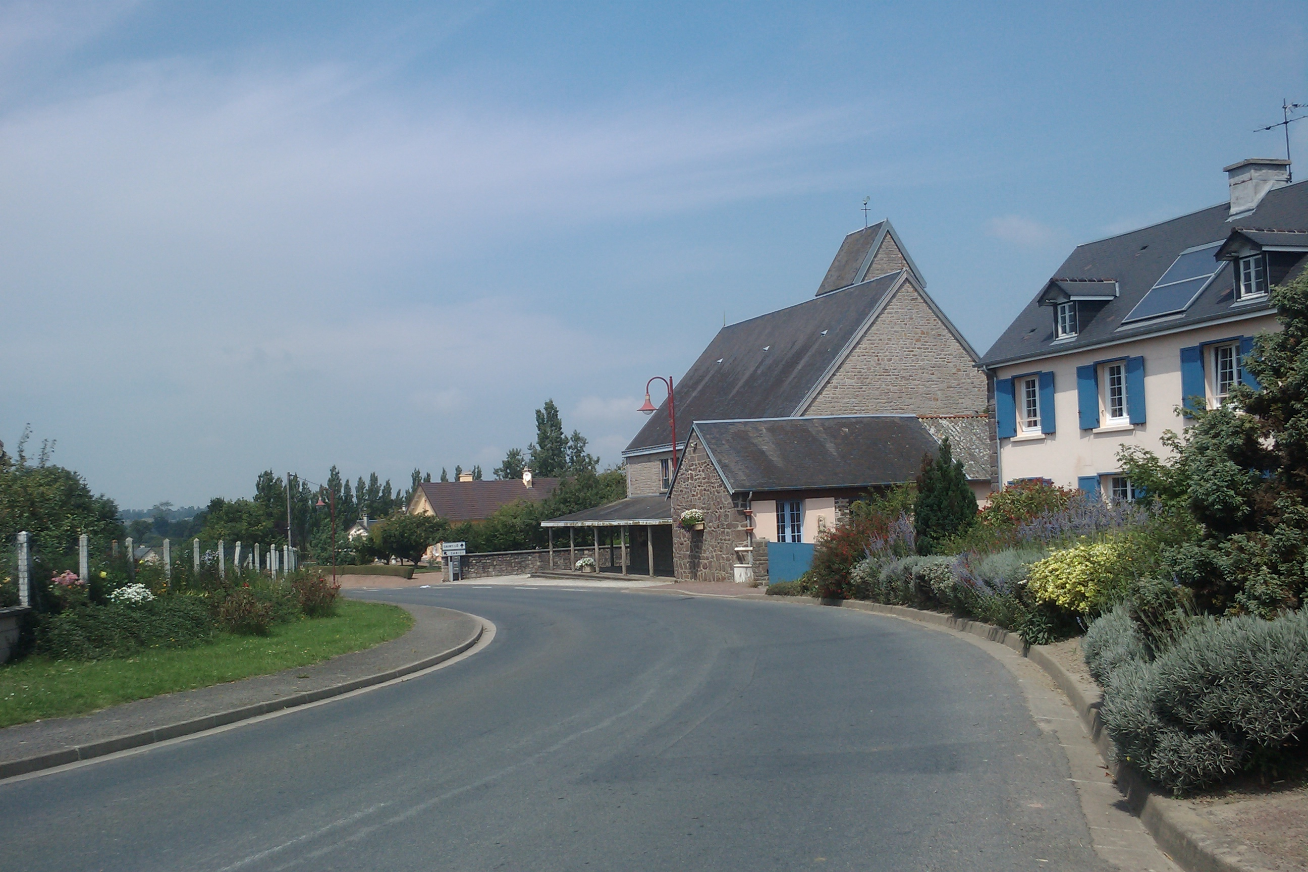 Commune du Le Mesnil-Opac avec son église à droite